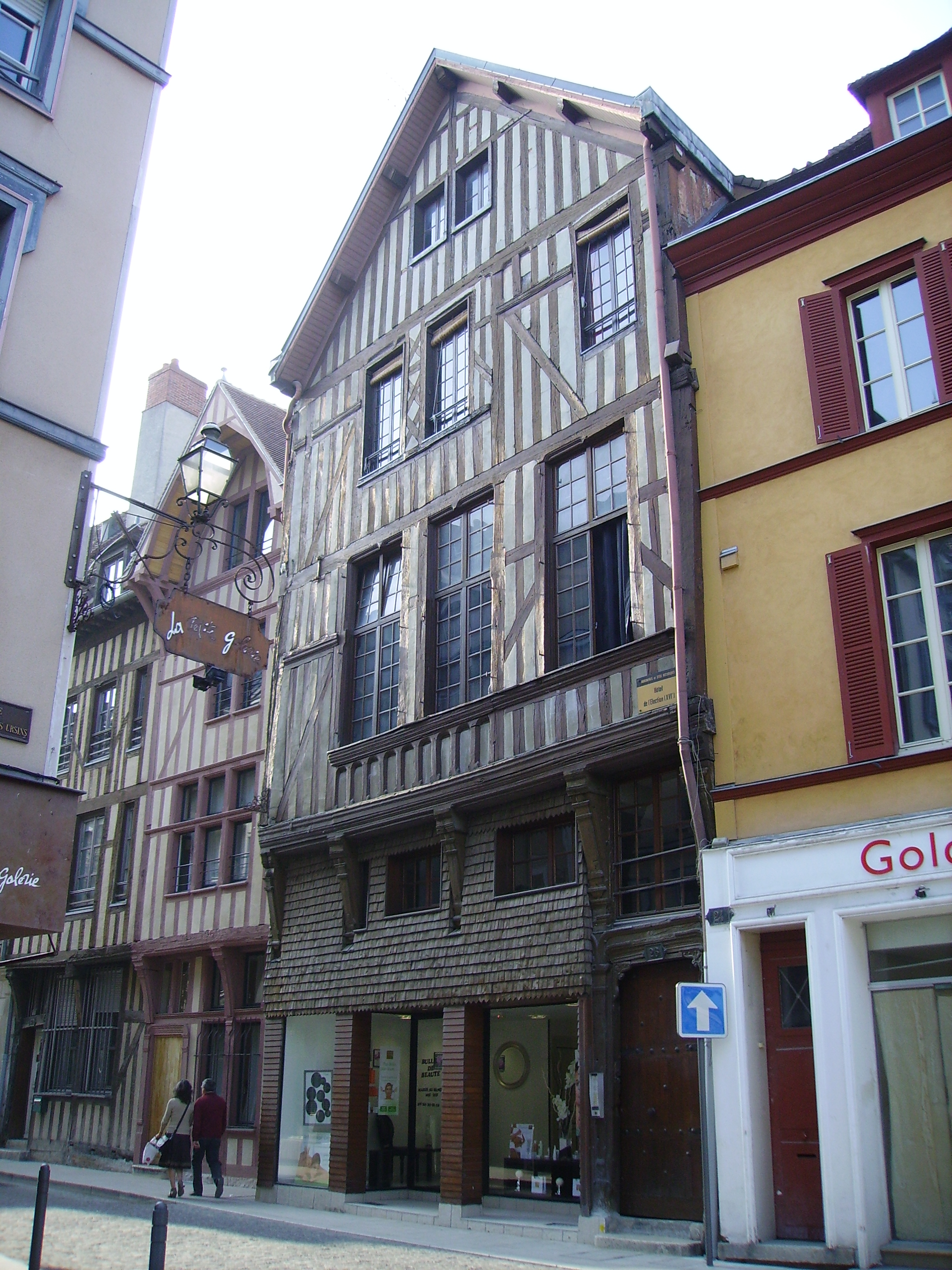 Maison de l'Election Troyes